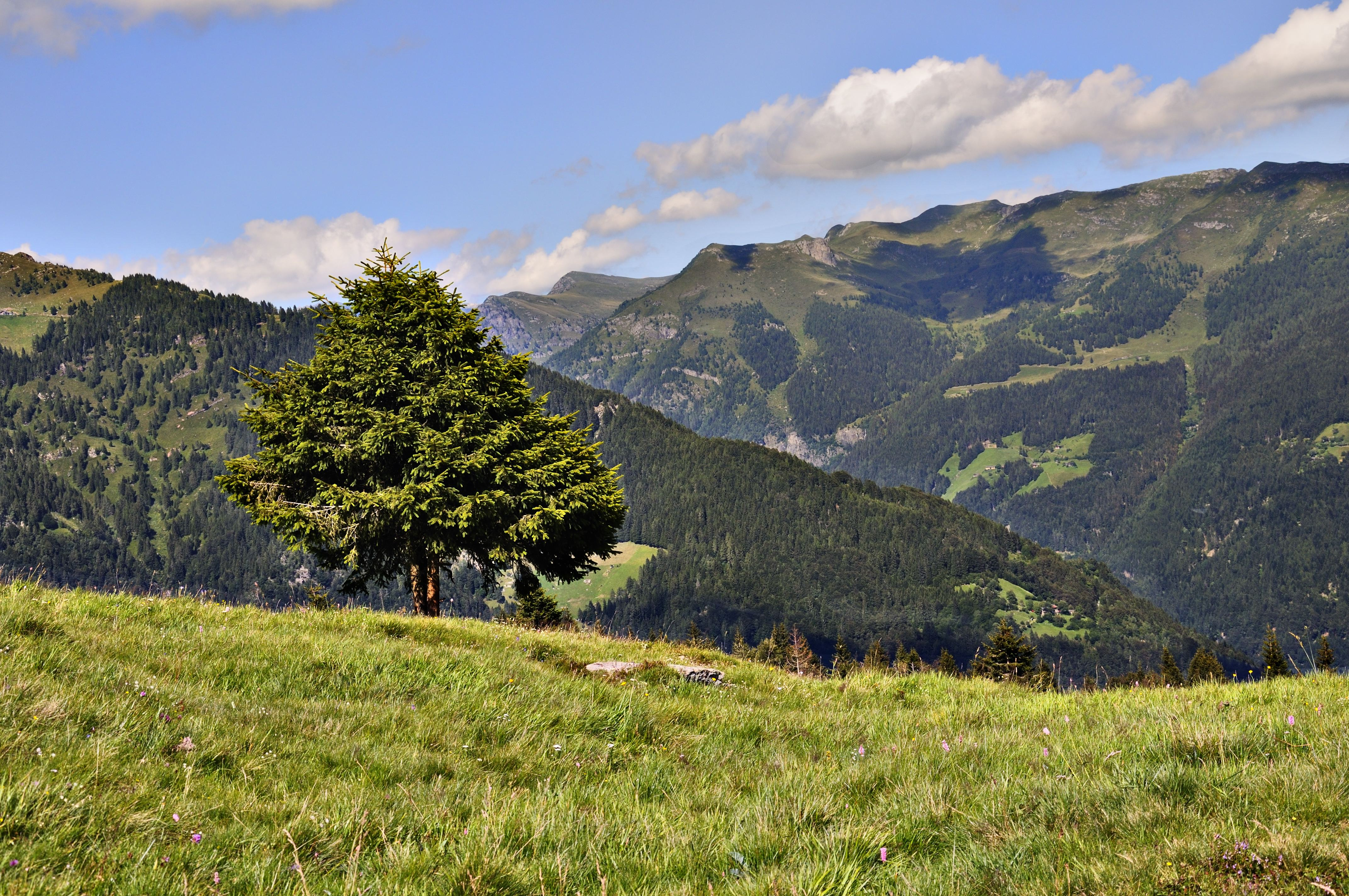 Maniva